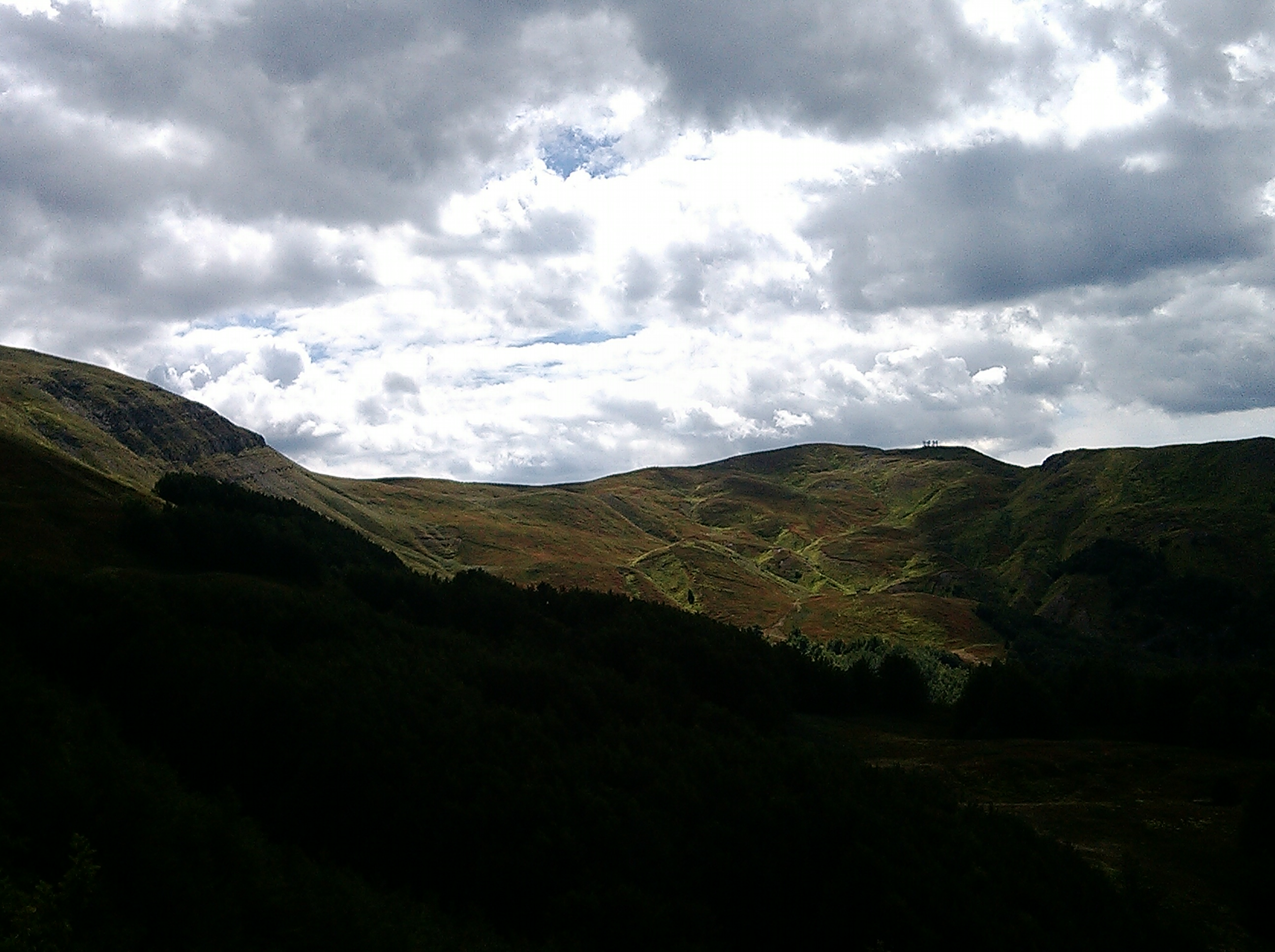 Vista da Passo del Lupo, presso Corno alle Scale, Appennino Tosco-Emiliano